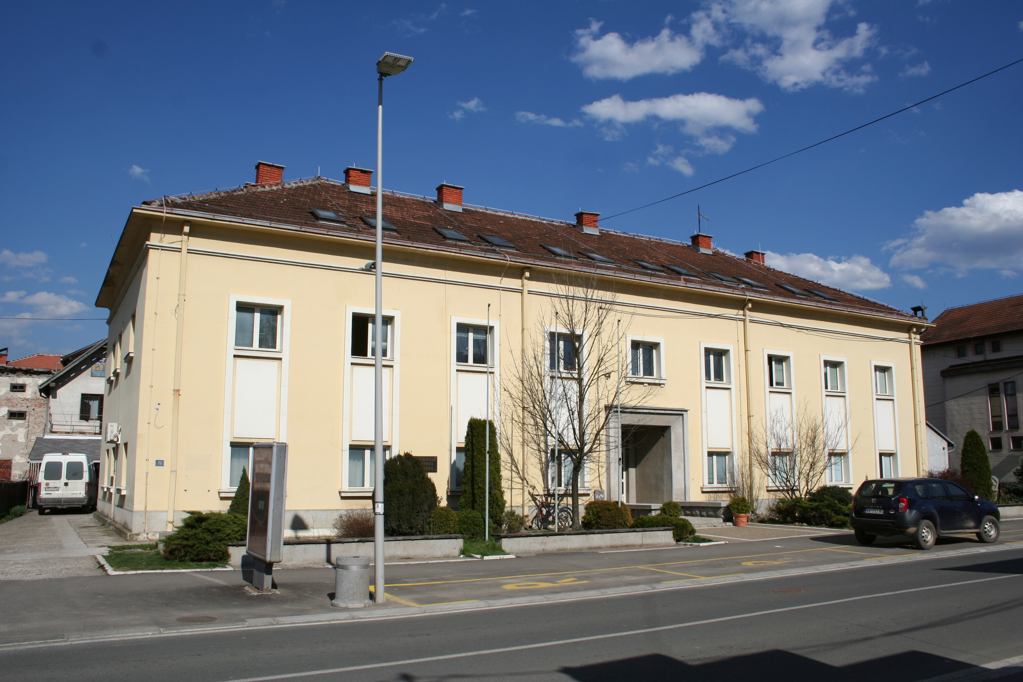 Spomenici i zgrade u Osečini